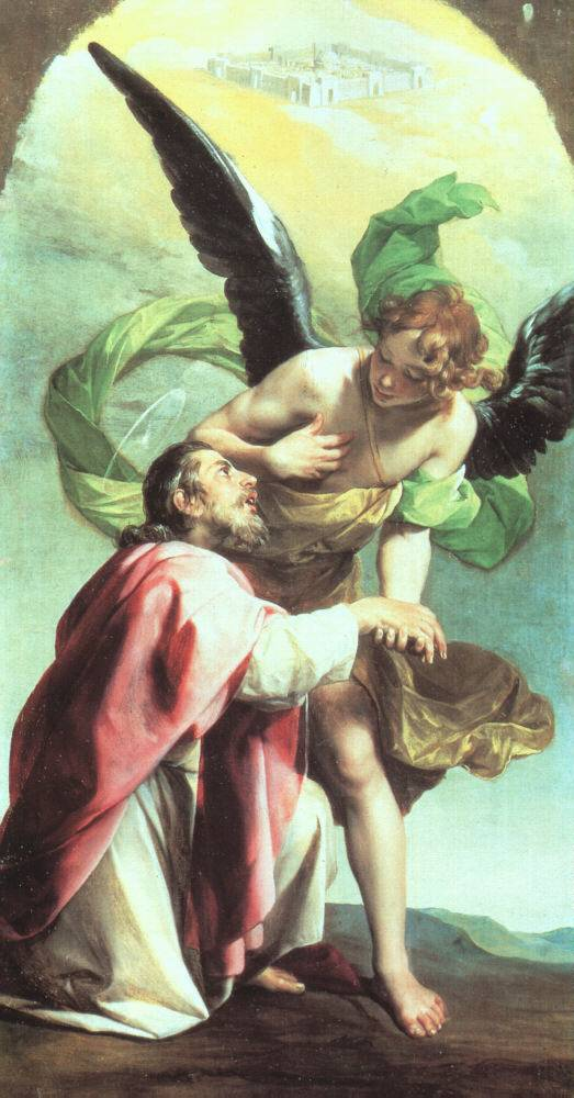 Vision des Hl. Johannes von Alono Cano